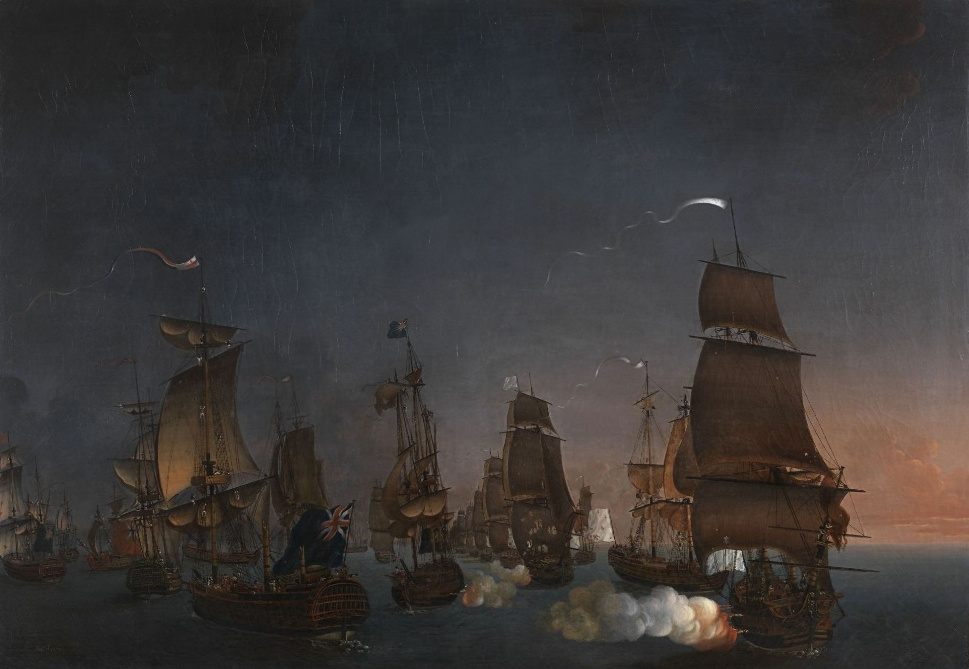 La bataille de Négapatam le 6 juillet 1782, entre l'escadre française de Suffren et celle de Hugues, sur la côte de Coromandel. Guerre d'Indépendance américaine (1774-1783). Mesures : H. 115 cm, l. 165 cm. H. 142.5 cm, l. 192 cm (cadre). Peinture à l'huile.